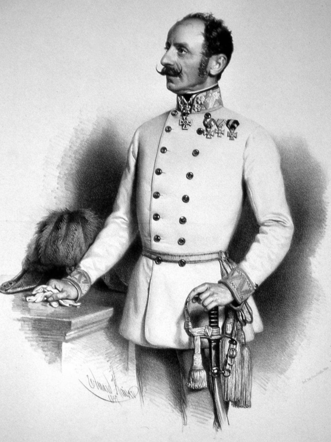 Ludwig Benedek (1804-1881), k. k. Feldzeugmeister. Lithographie von Eduard Kaiser,1857